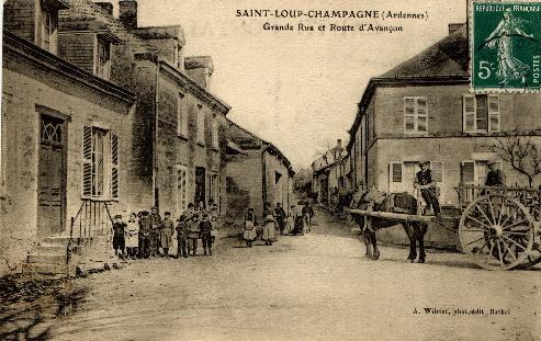 Saint-Loup-en-Champagne : Grande rue et route d'Avançon en 1913.